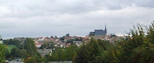 Lommatzsch von Norden, Foto selbst erstellt: Acf 2004, Public Domain